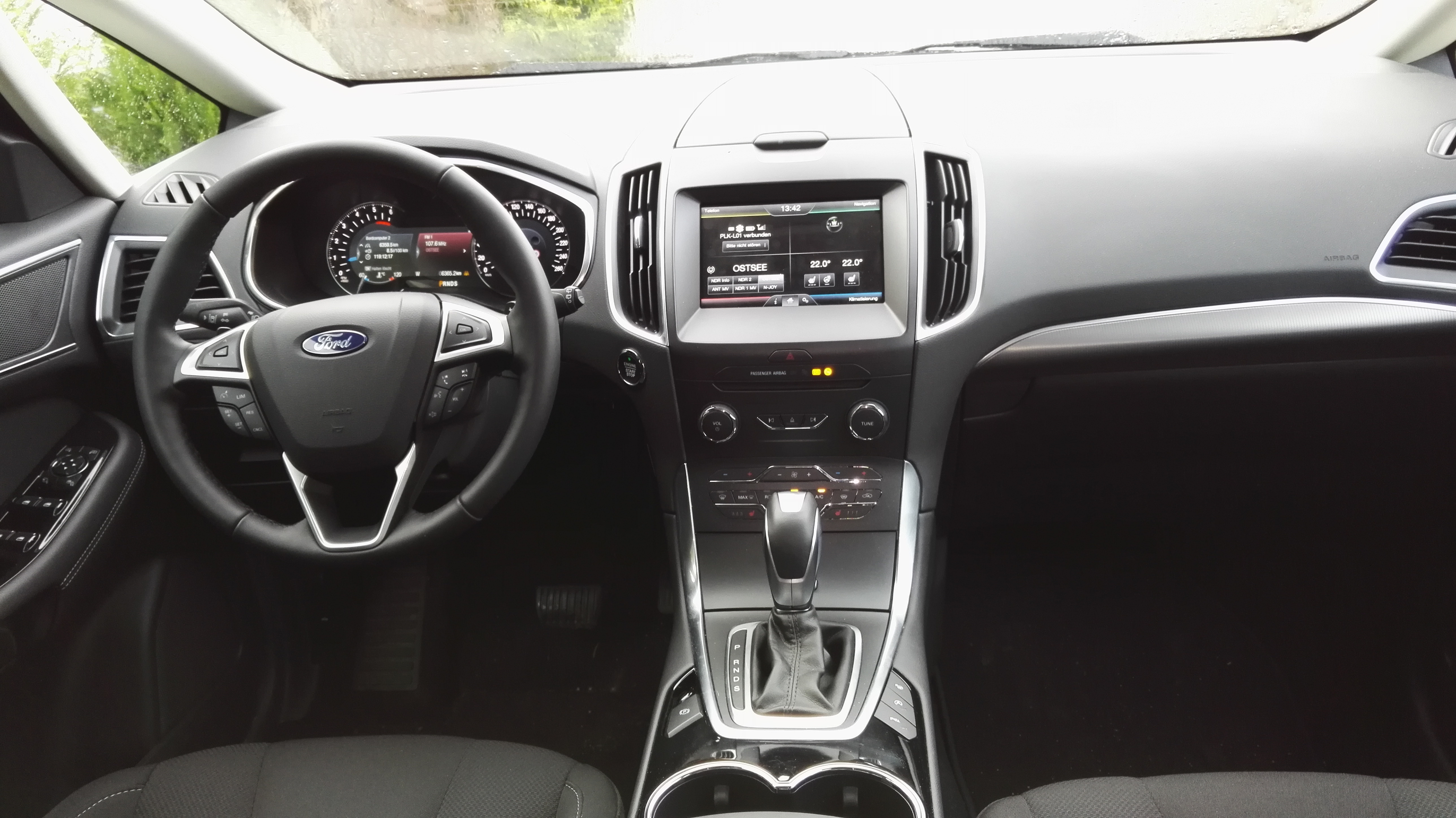 Bild des S-Max 2015 Innenraums